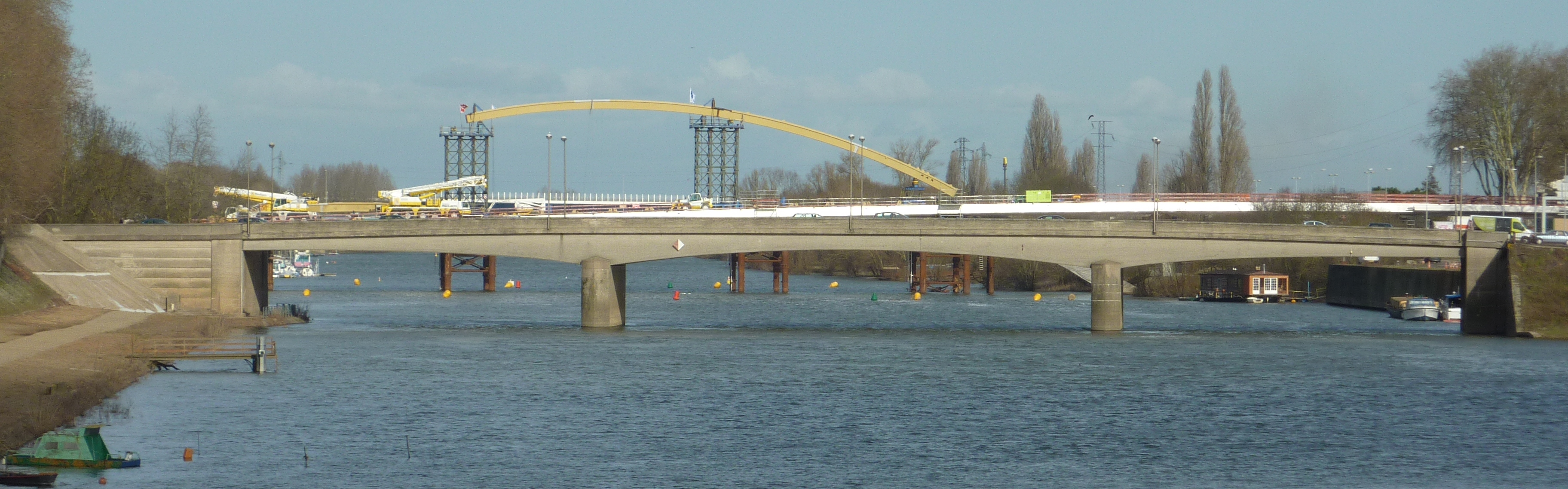 Vue sur le Pont Confluence en travaux